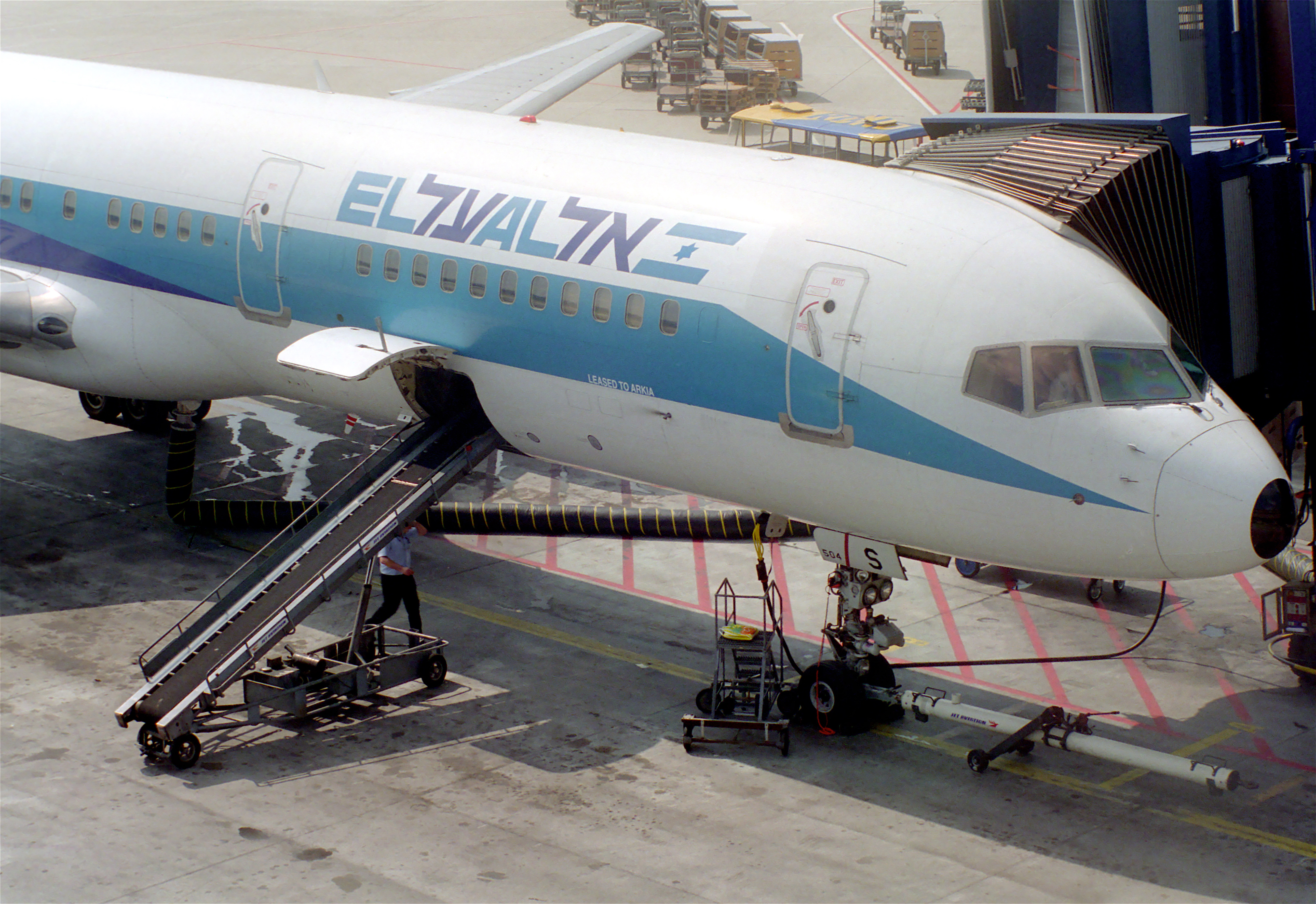 El Al Boeing 757-258; 4X-EBS@ZRH;01.10.1994